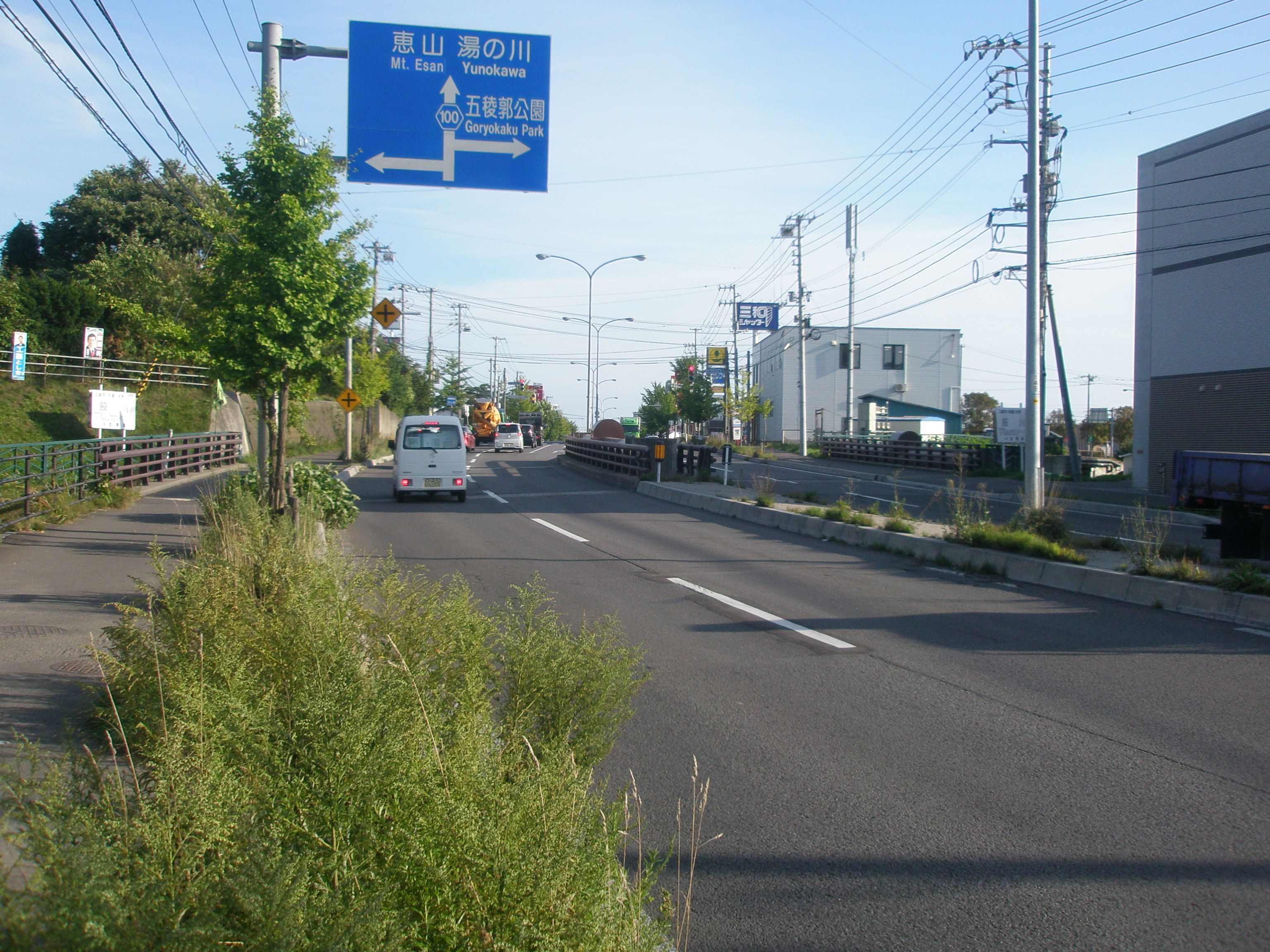 北海道道100号函館上磯線・鍛神橋（終点側から見る）